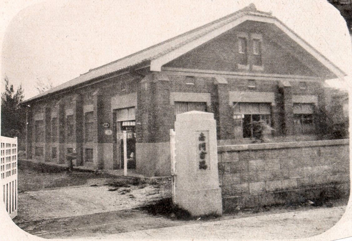 臺南市南門市場，約於1931年建於台南市南門町